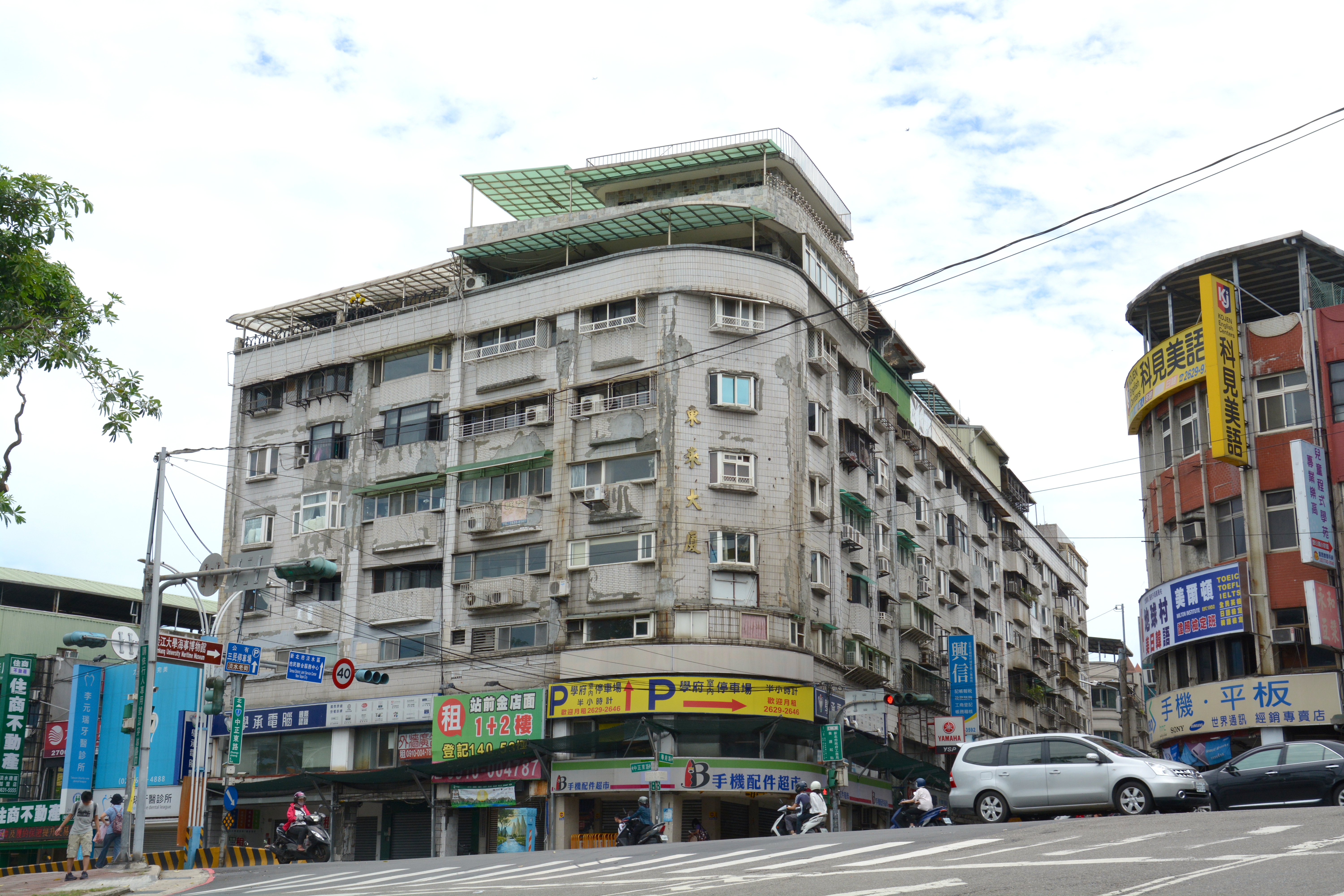 中文（台灣）: 東來大廈建於民國77年(1988年)，於民國101年(2012年)判定為危樓，預計於民國108年(2019年)9月進行拆除。攝於新北市淡水區中正東路與學府路口(台北捷運淡水站對面)。